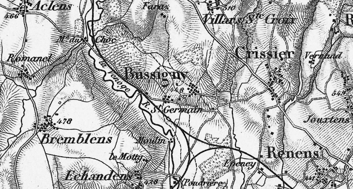 Vieille carte de Bussigny et ses environs vers 1855.